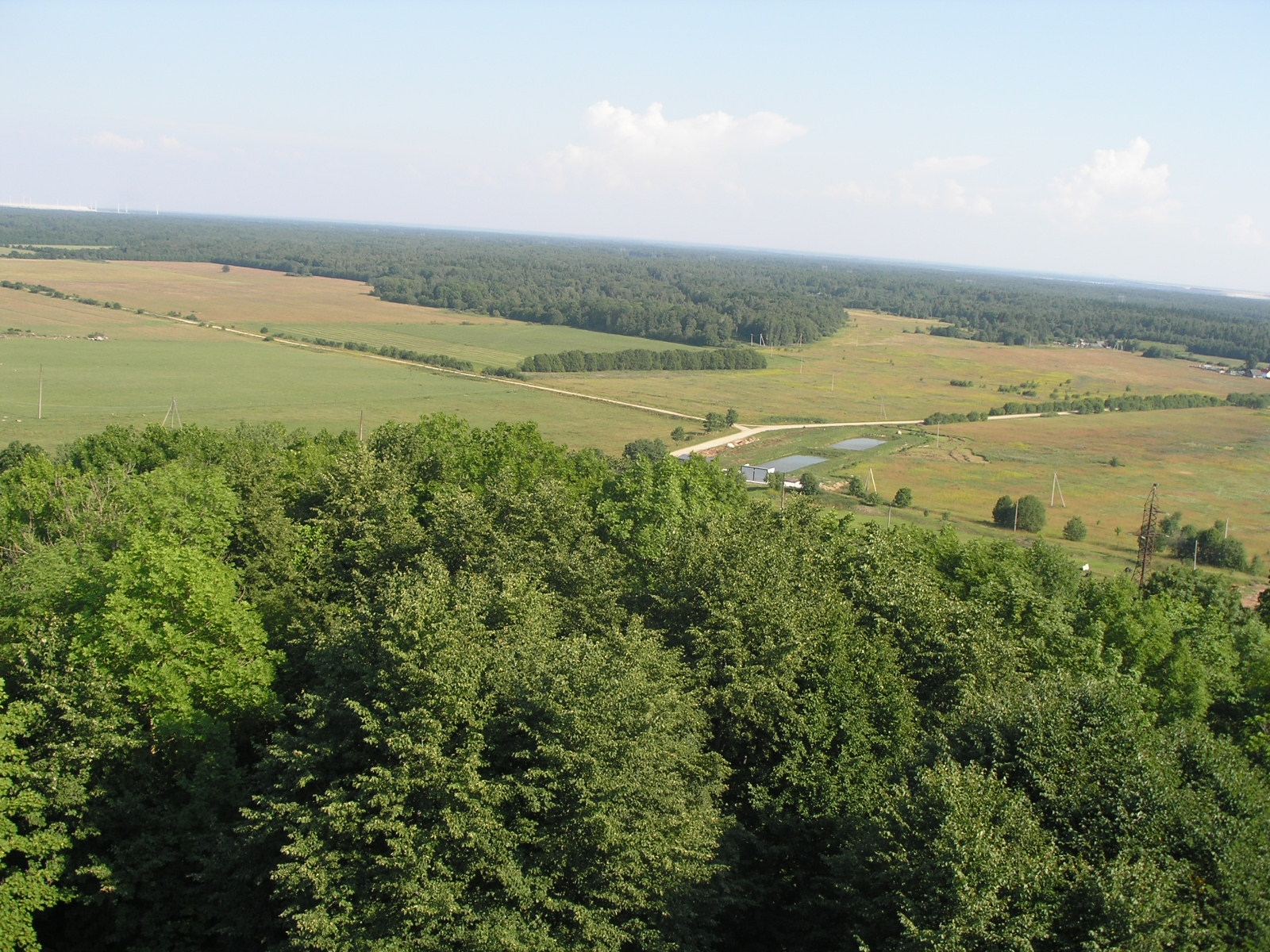 Ida-Virumaa maastik, vaade Sinimägede vaatetornist.